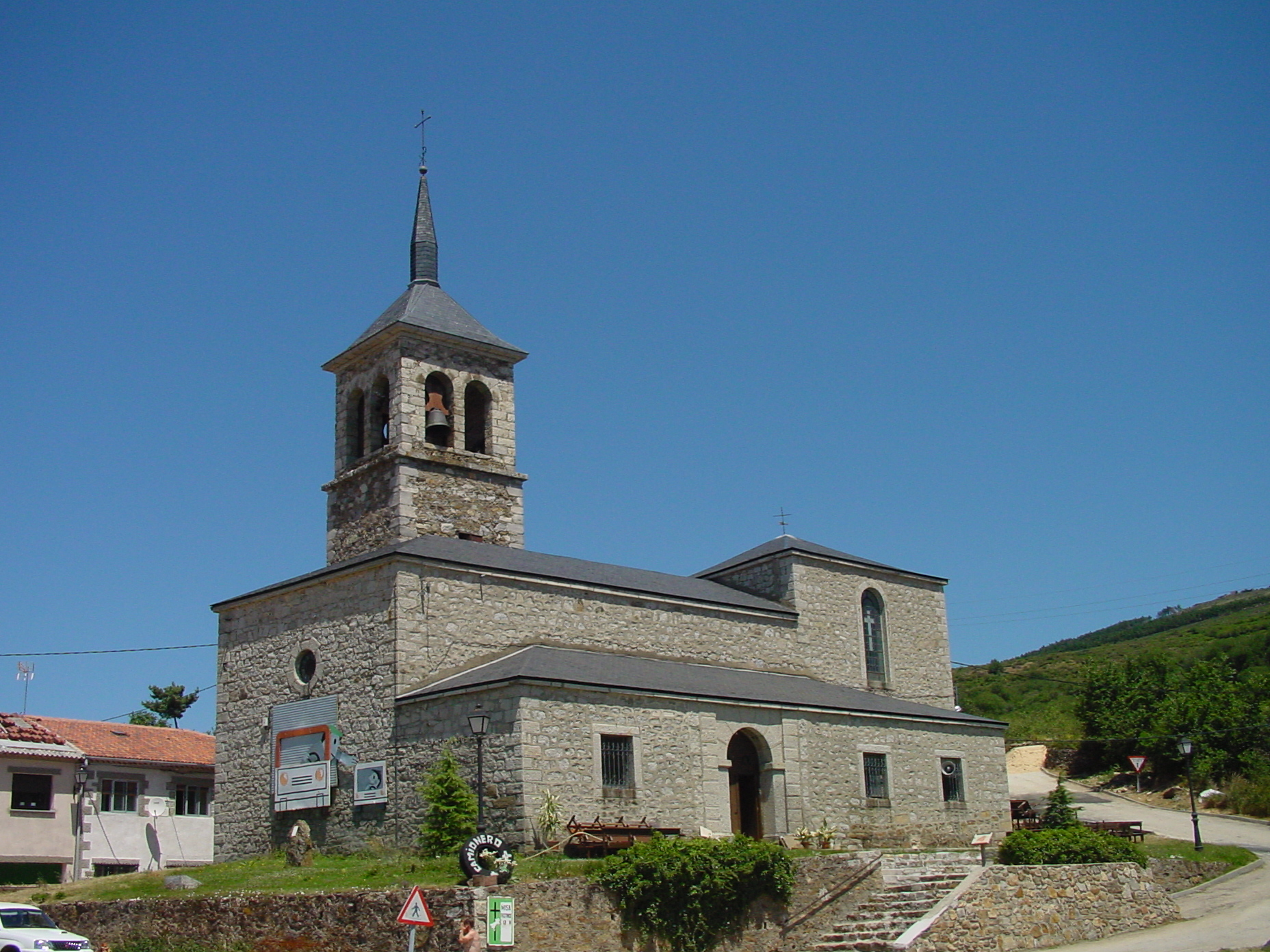 Parroquia Nuestra Señora de las Nieves en Somosierra.